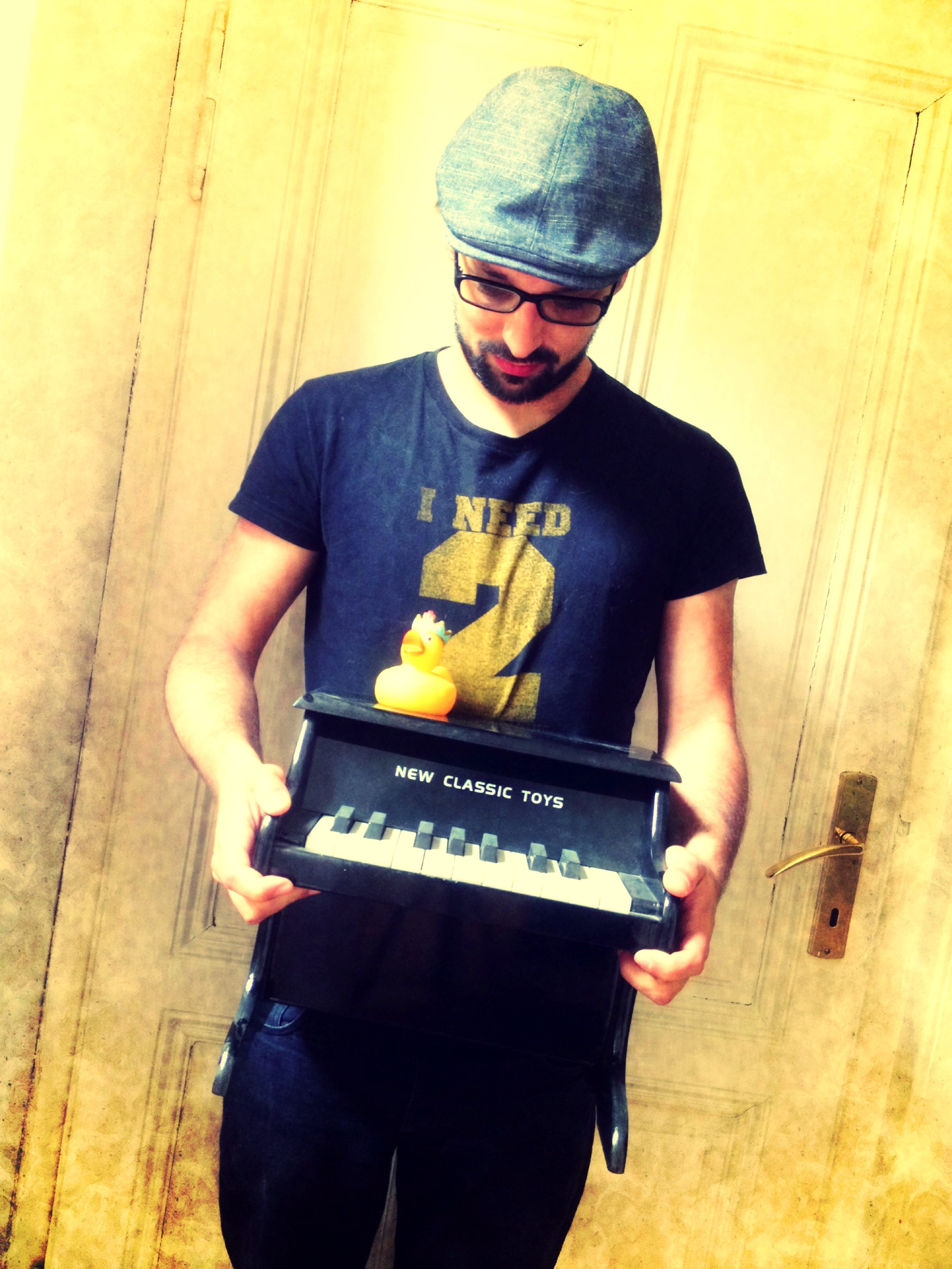 Richard Kapp, Musiker aus Wien, Österreich